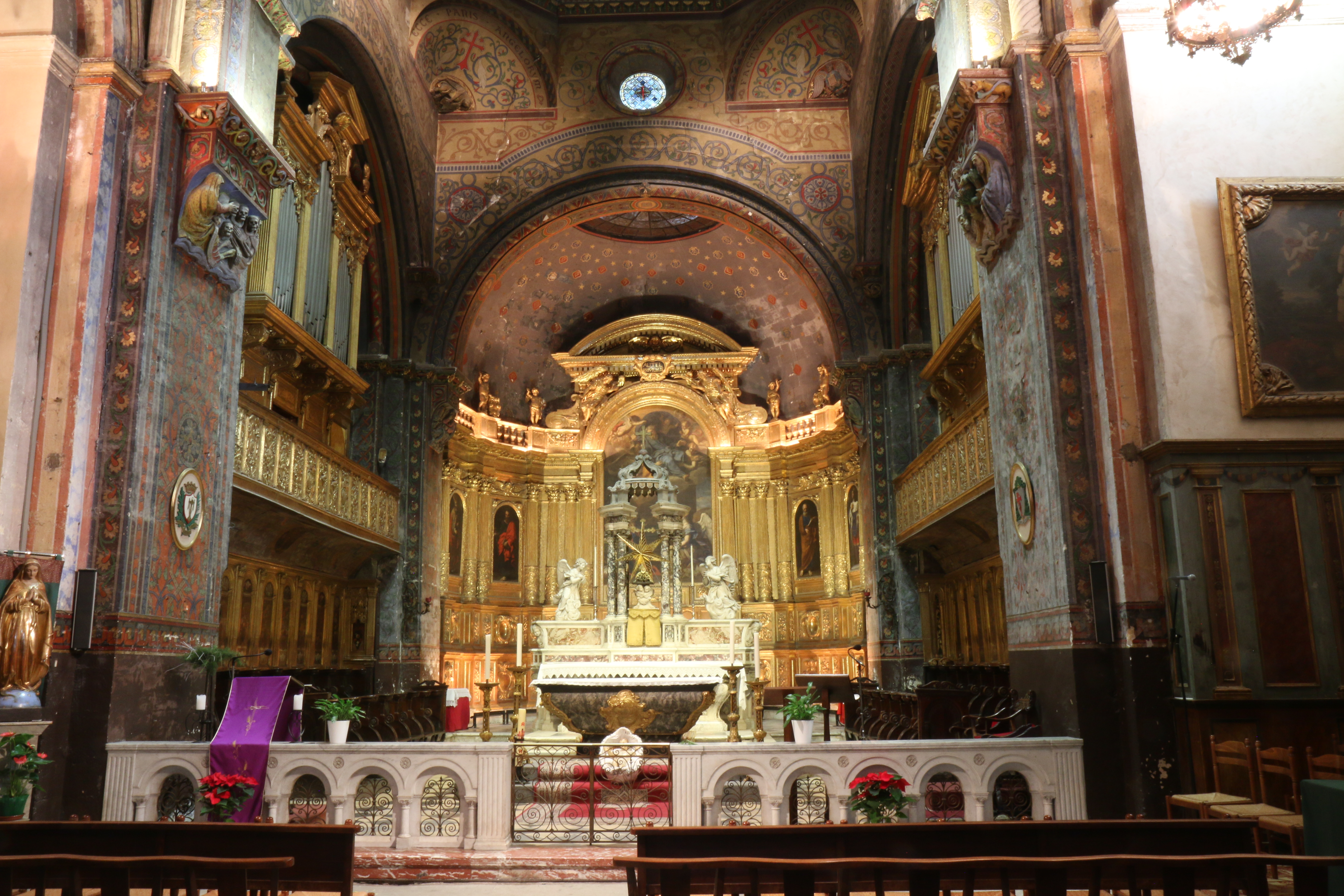 Vue du chœur et de l'abside de la cathédrale de Cavaillon. Au fond retable avec cinq toiles de Nicolas Mignard. Dans le choeur à gauche l'orgue réel et à droite l'orgue factice.